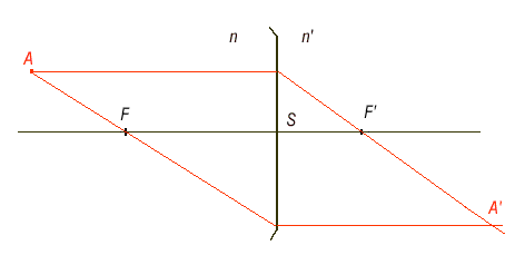 Schéma dioptre sphérique dans les conditions de Gauss : foyers et tracés de rayons (schéma personnel) Catégorie:Schéma de physique